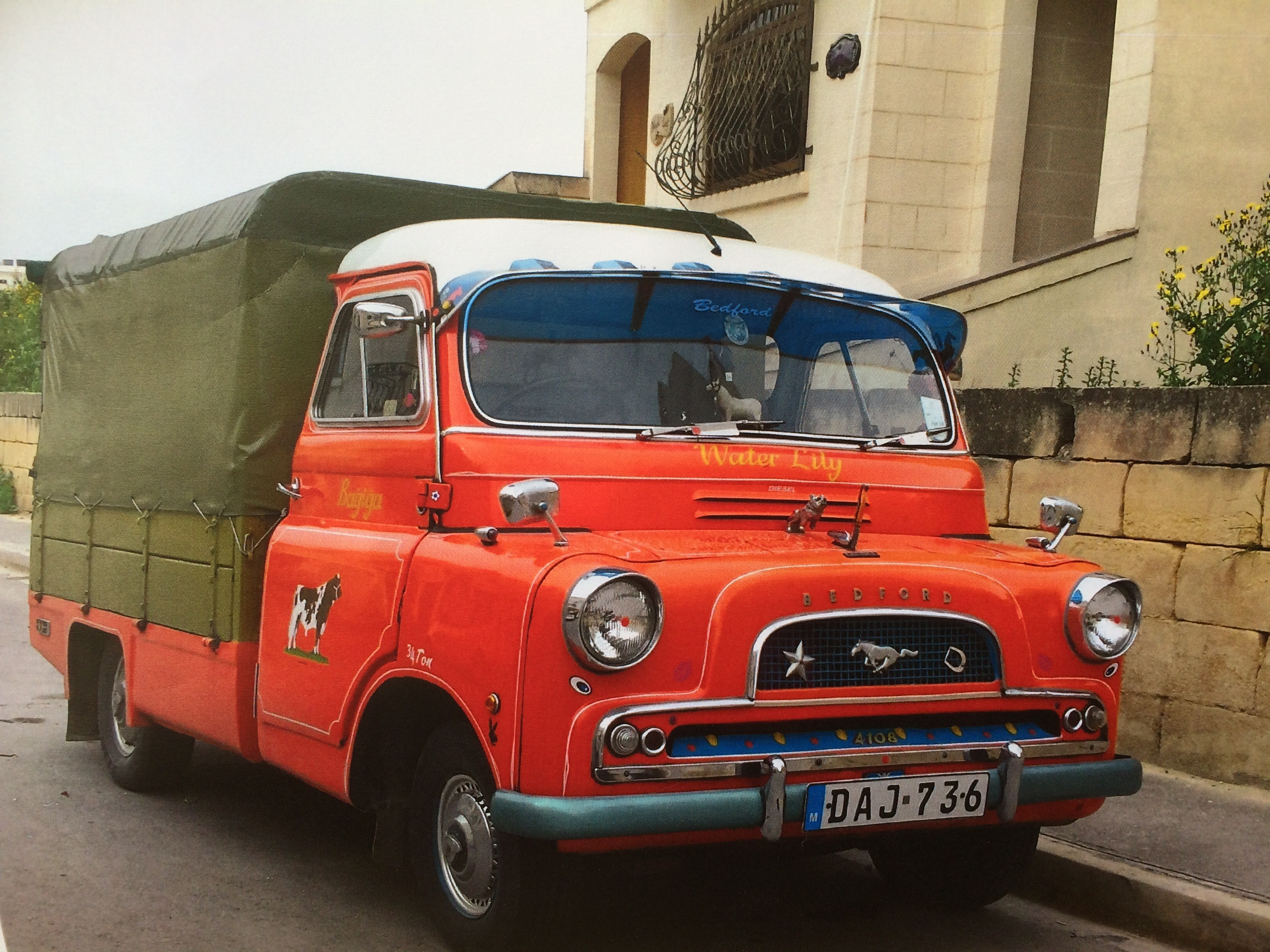 Bedford CA